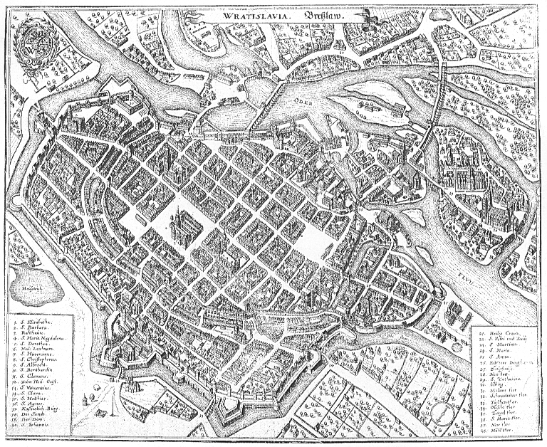 Plan und Ansicht der Stadt Breslau